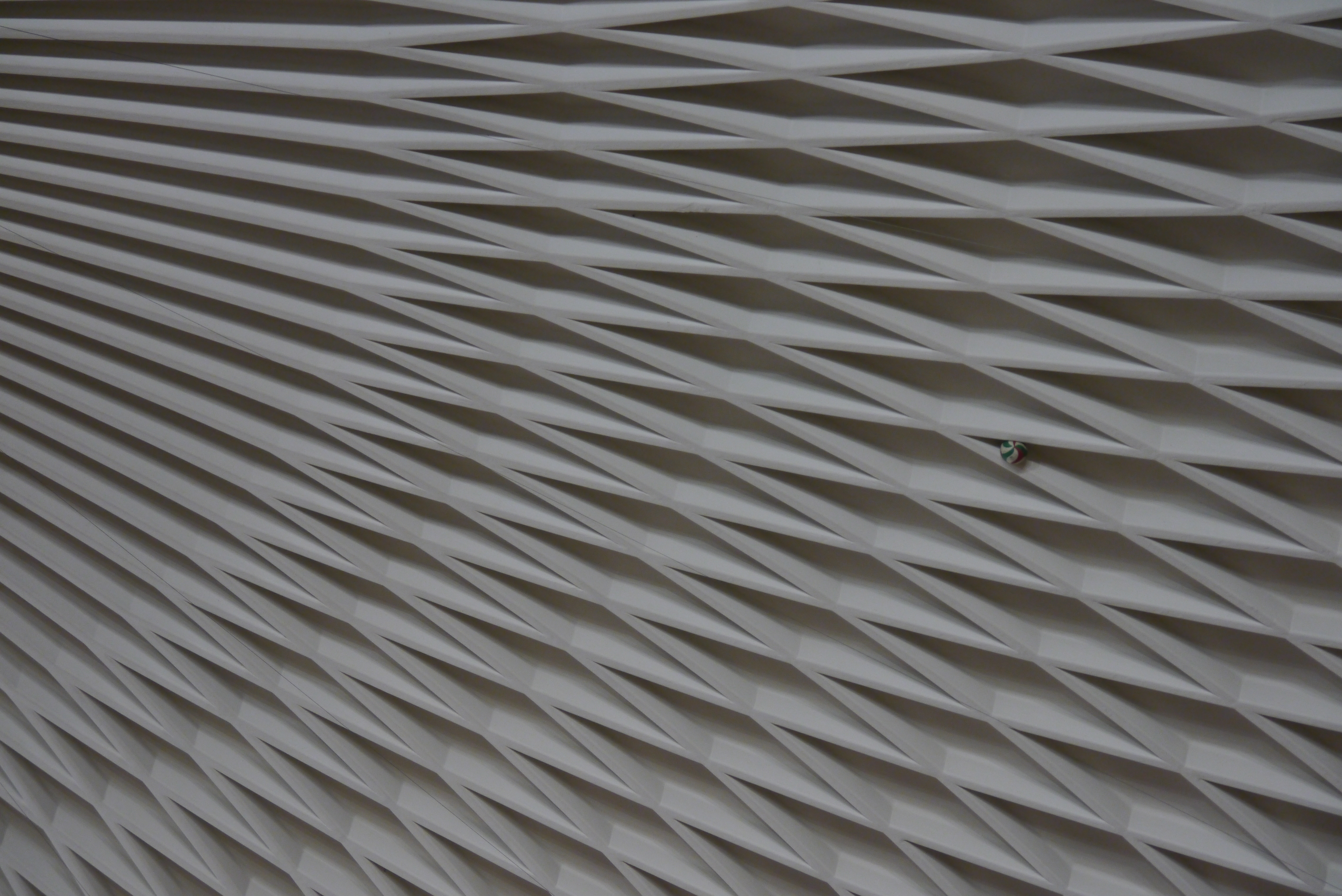 Palazzetto dello Sport, Roma